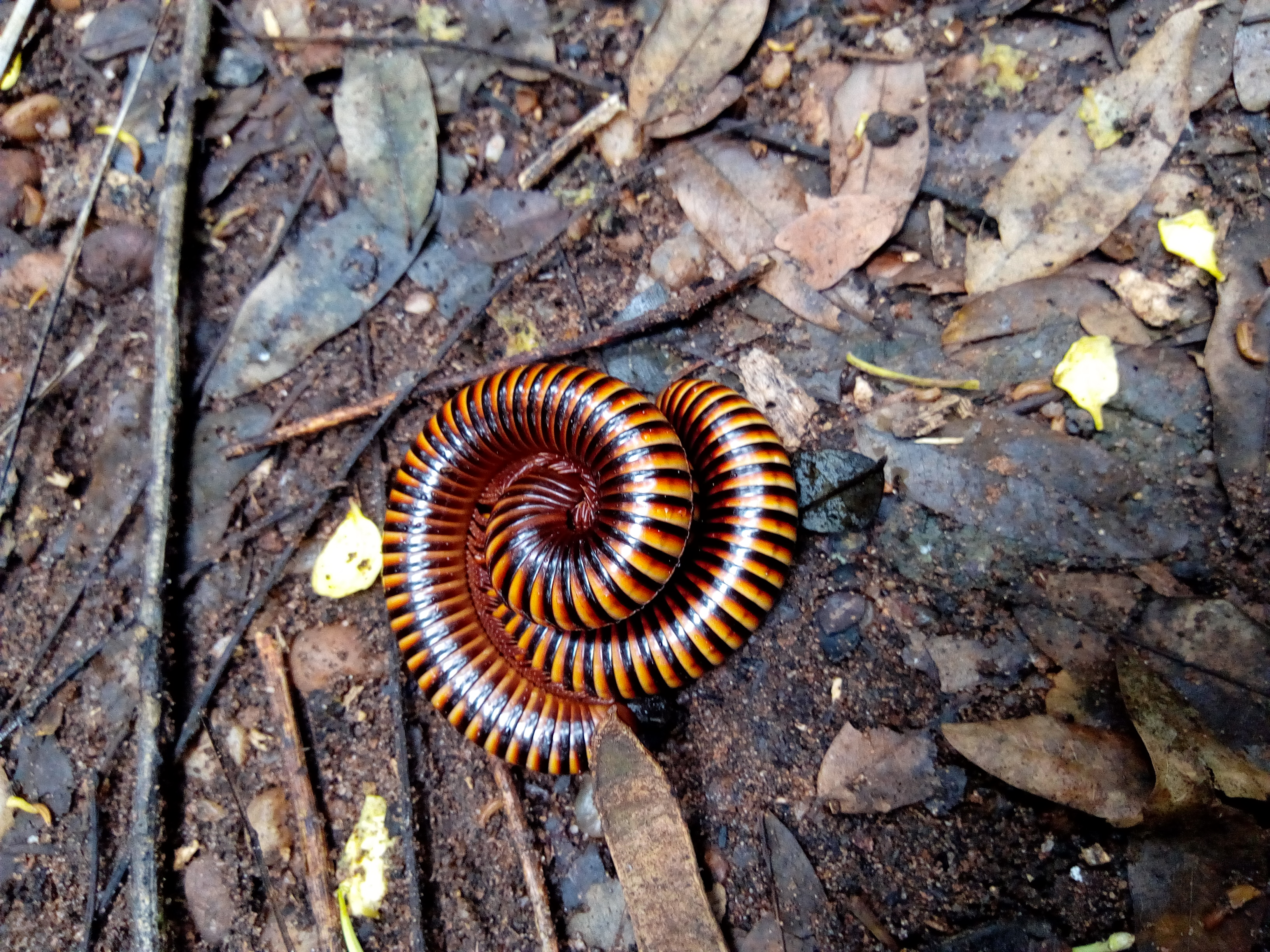 mille pattes du sanctuaire des singes de Drabo à Calavi